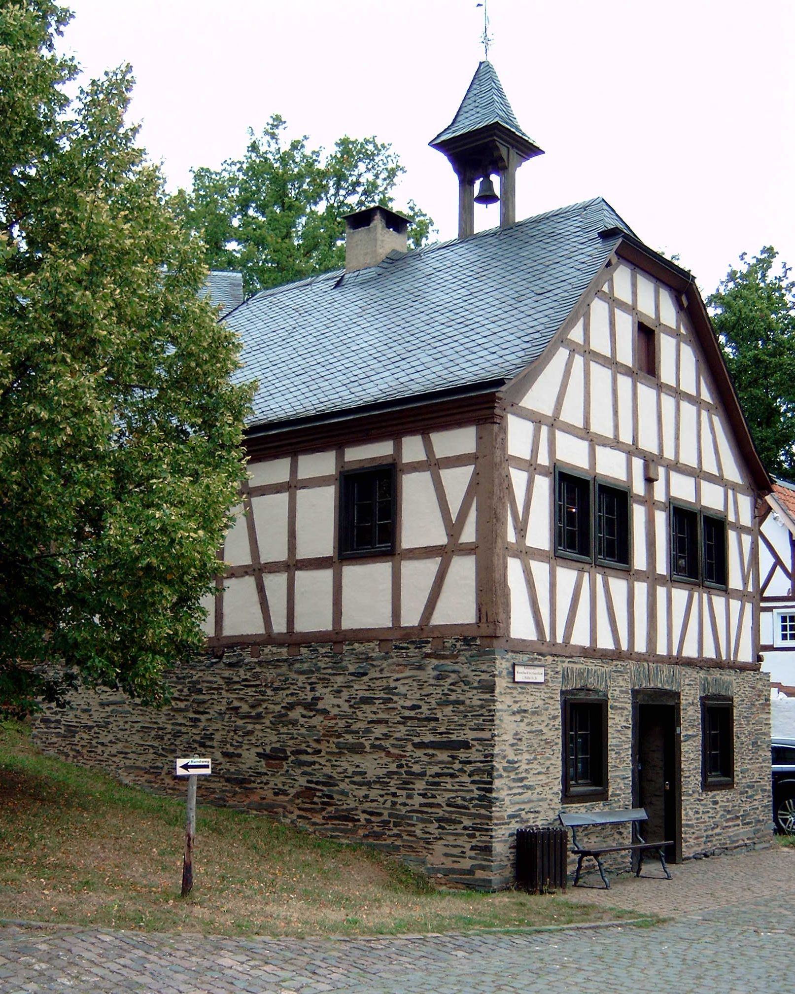 Ehemaliges Rathaus aus Hasselbach. Erbaut 1750. Abbau erfolgte 1977, Grund: Unbenutzbarkeit. In den Jahren 1978/79 wurde es im Freilichtmuseum in Bad Sobernheim wieder aufgebaut.